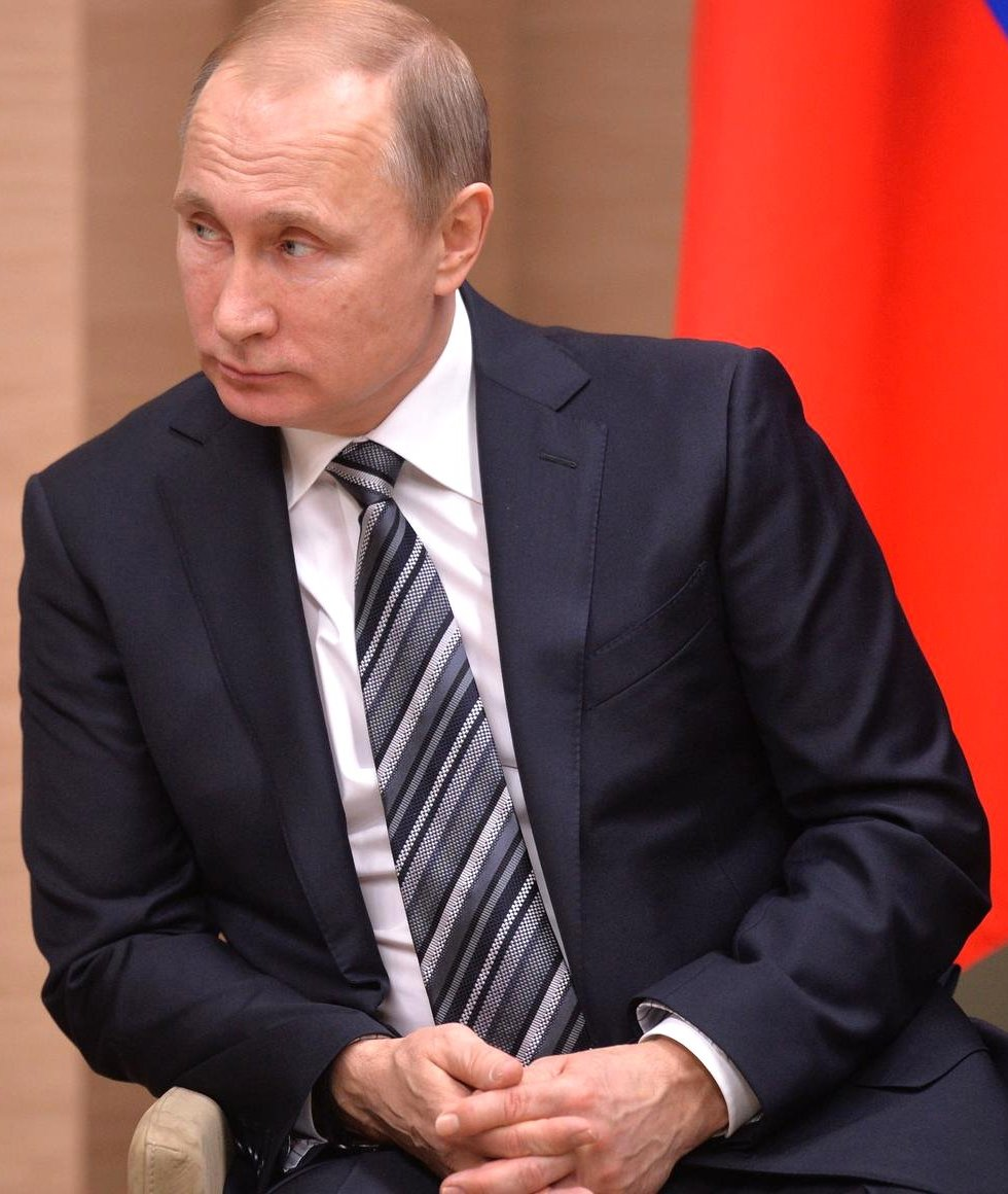 Президент России Владимир Путин во время встречи с Президентом Греции Прокописом Павлопулосом